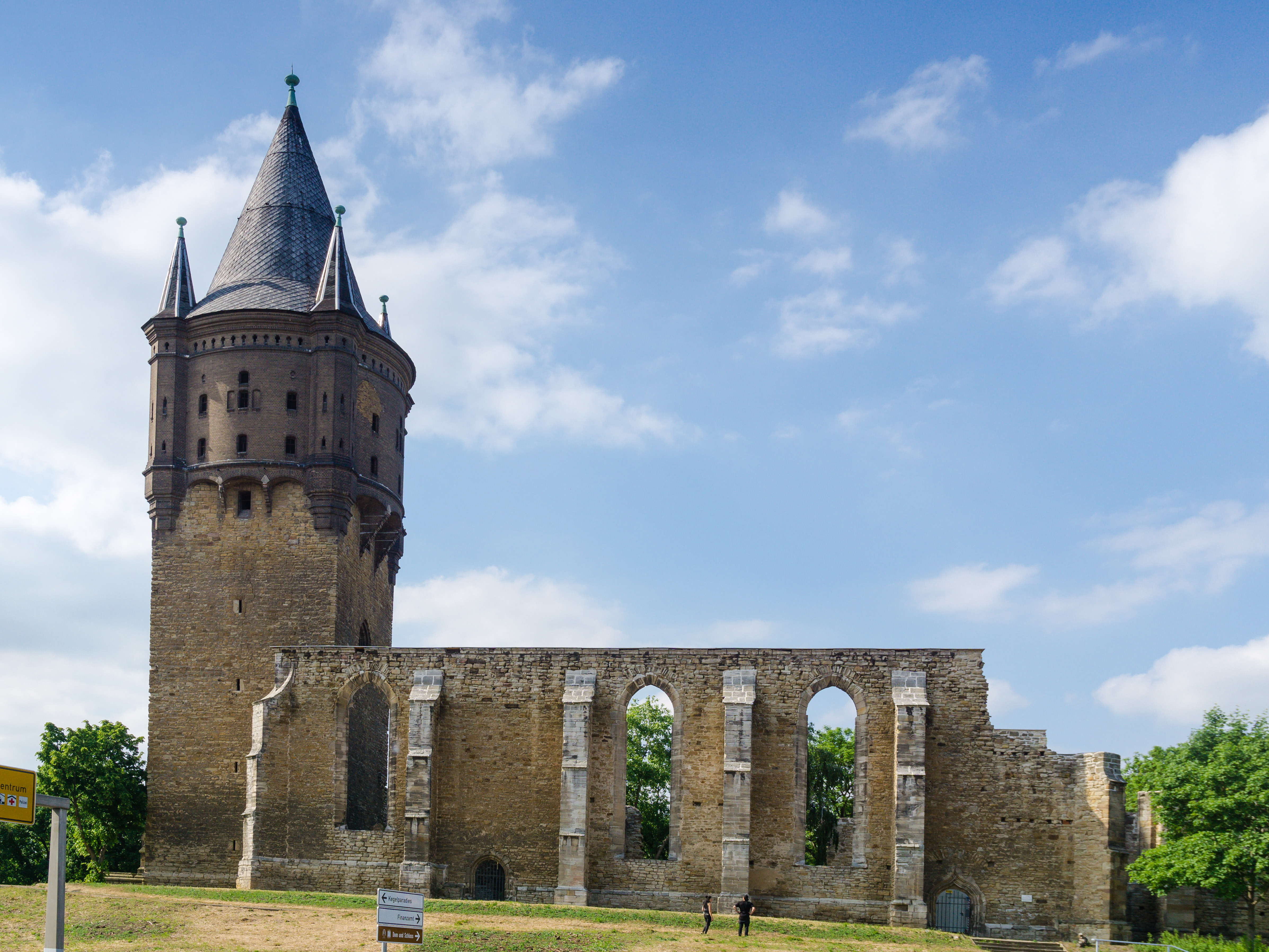 Wasserturm, aufgesetzt auf den Turm der Kirchenruine Sankt Sixti, Sixti-Straße in Merseburg